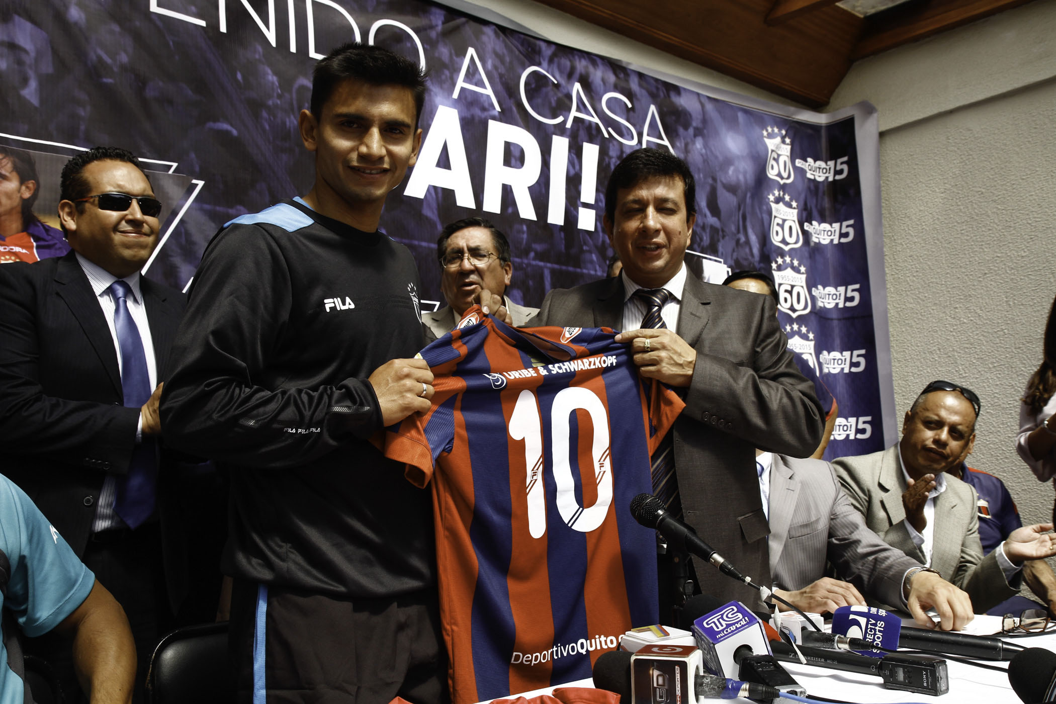 Quito, 03 mar (ANDES).- El equipo del Deportivo Quito presentó en su sede ubicada al norte de Quito, a su nueva contratación Luis Fernando Saritama. Foto: Micaela Ayala V./ANDES